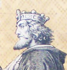 Dresdener Fürstenzug - Albrecht der Stolze